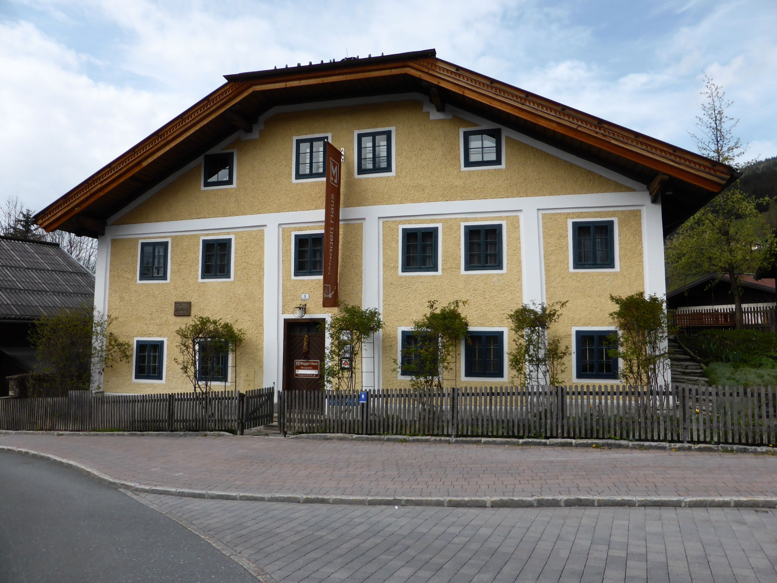 Bürgerhaus, Waggerlhaus